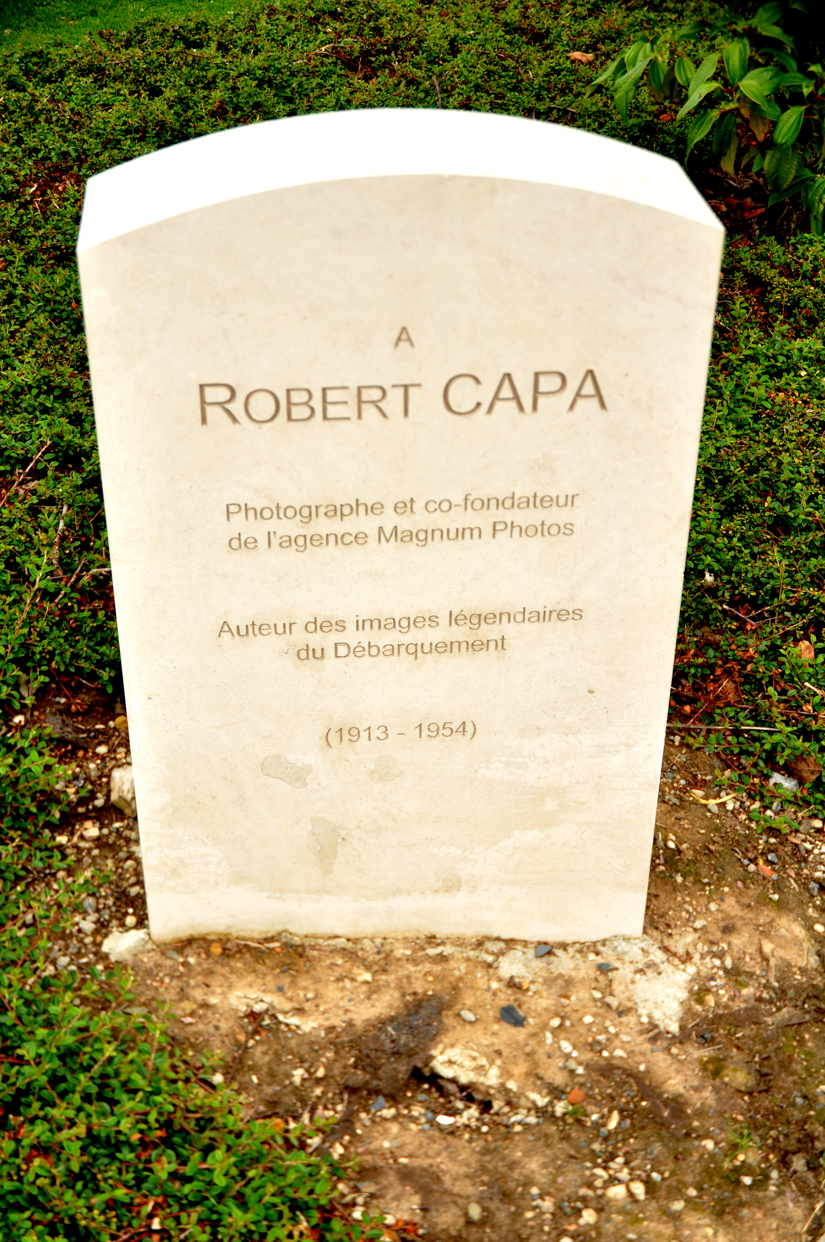 Lápida de Robert Capa en Bayeux (Normandía, Francia)[1] [su tumba está en Amawalk, Yorktown, Nueva York, Estados Unidos][2]